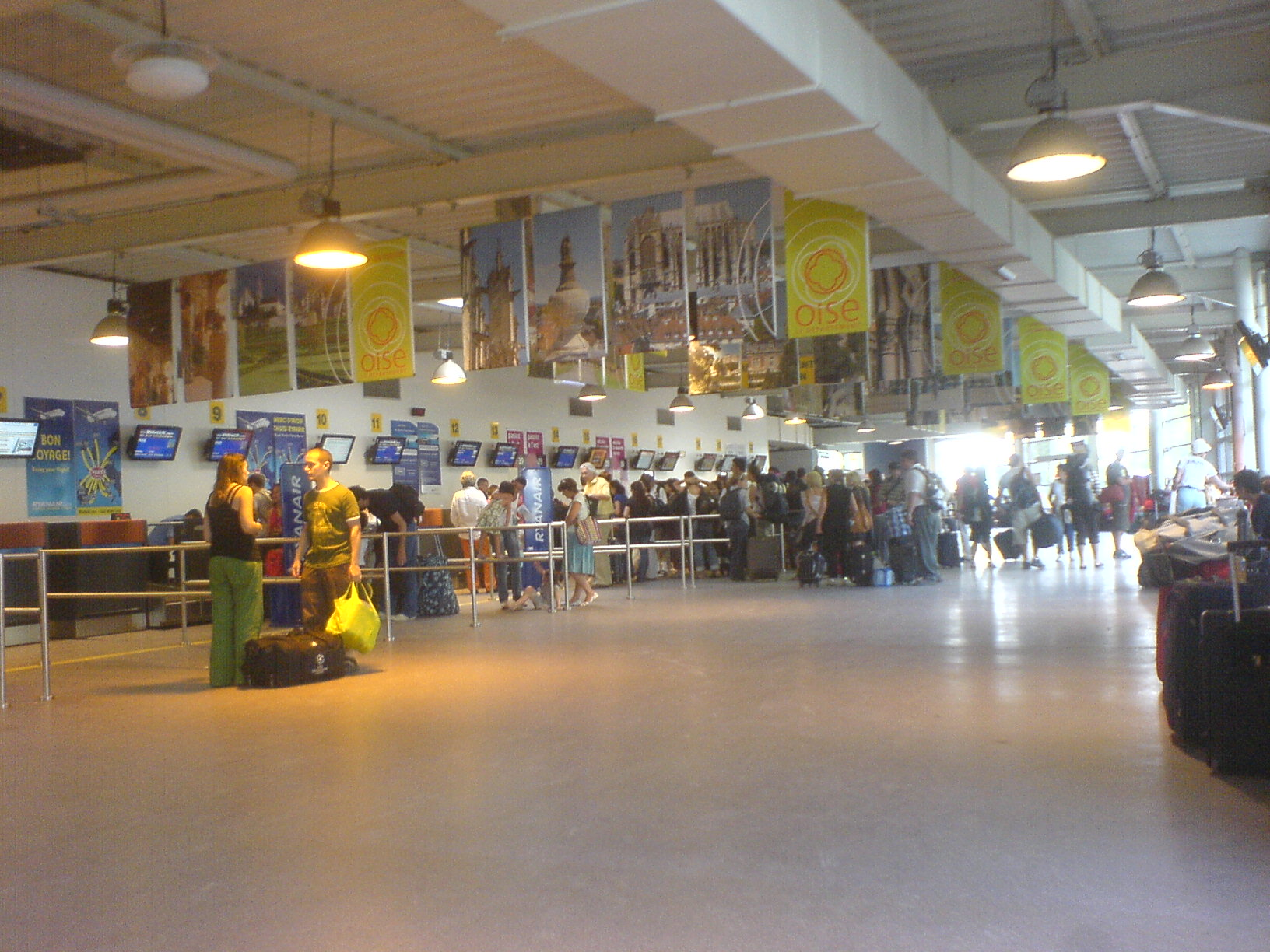 Castellano: cola de pasajeros para facturar en el aeropuerto de París Beauvais Tillé.